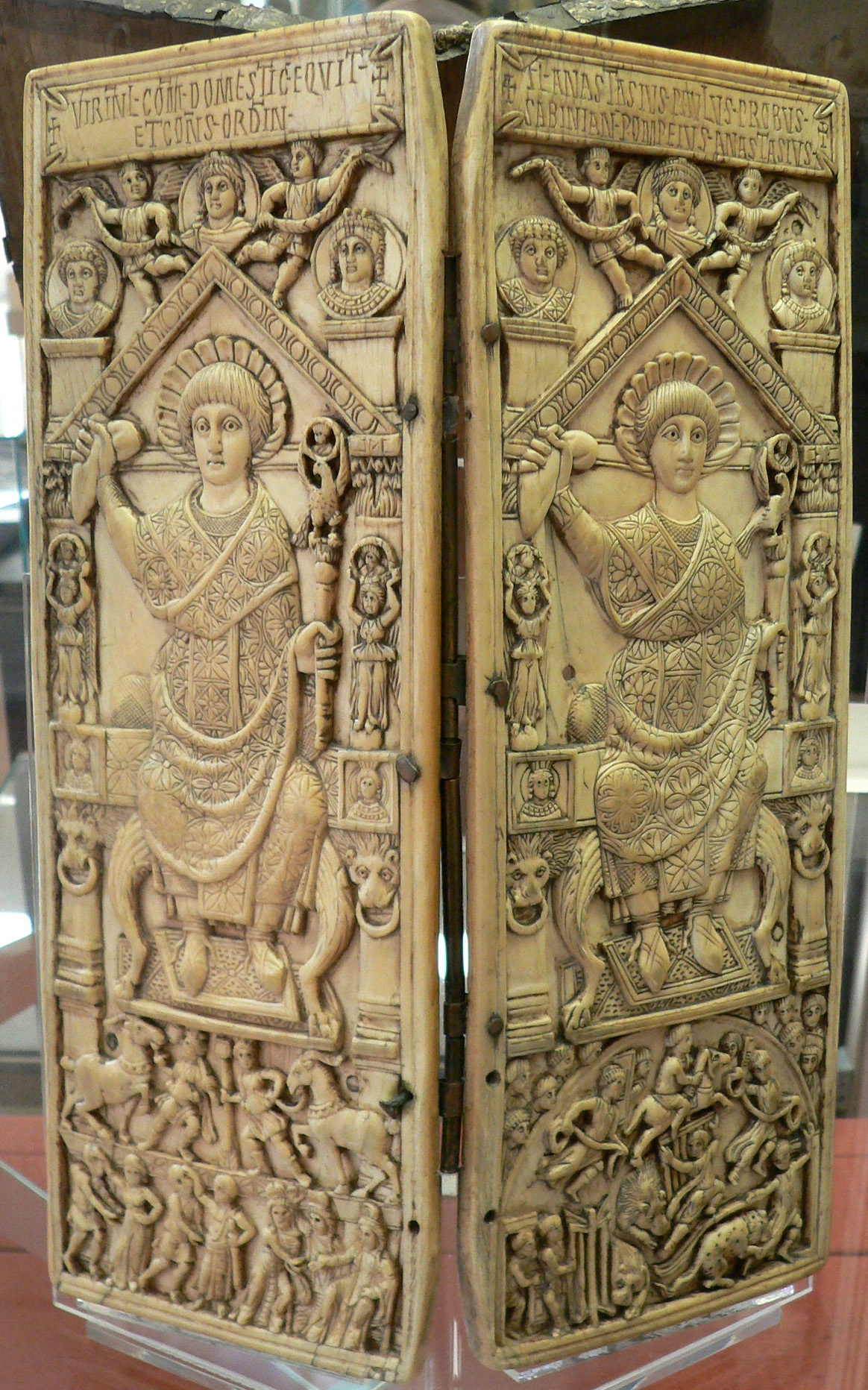 Diptyque de Flavius Anastasius Probus Diptyque. Consul en 517, Constantinople, Ivoire d'éléphant, Ancien trésor de Saint-Etienne de Bourges.